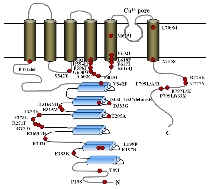 Los sitios de mutación natural en TRPV4 humano.